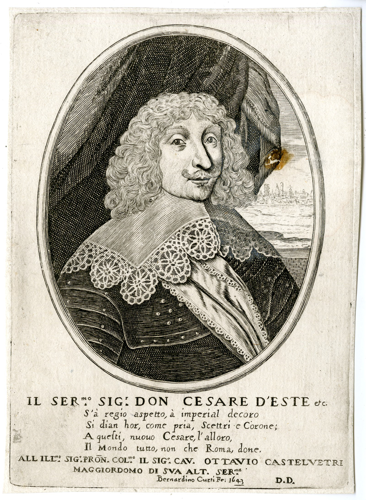 César de Este, duque de Módena-Reggio, grabado de Bernardino Curti